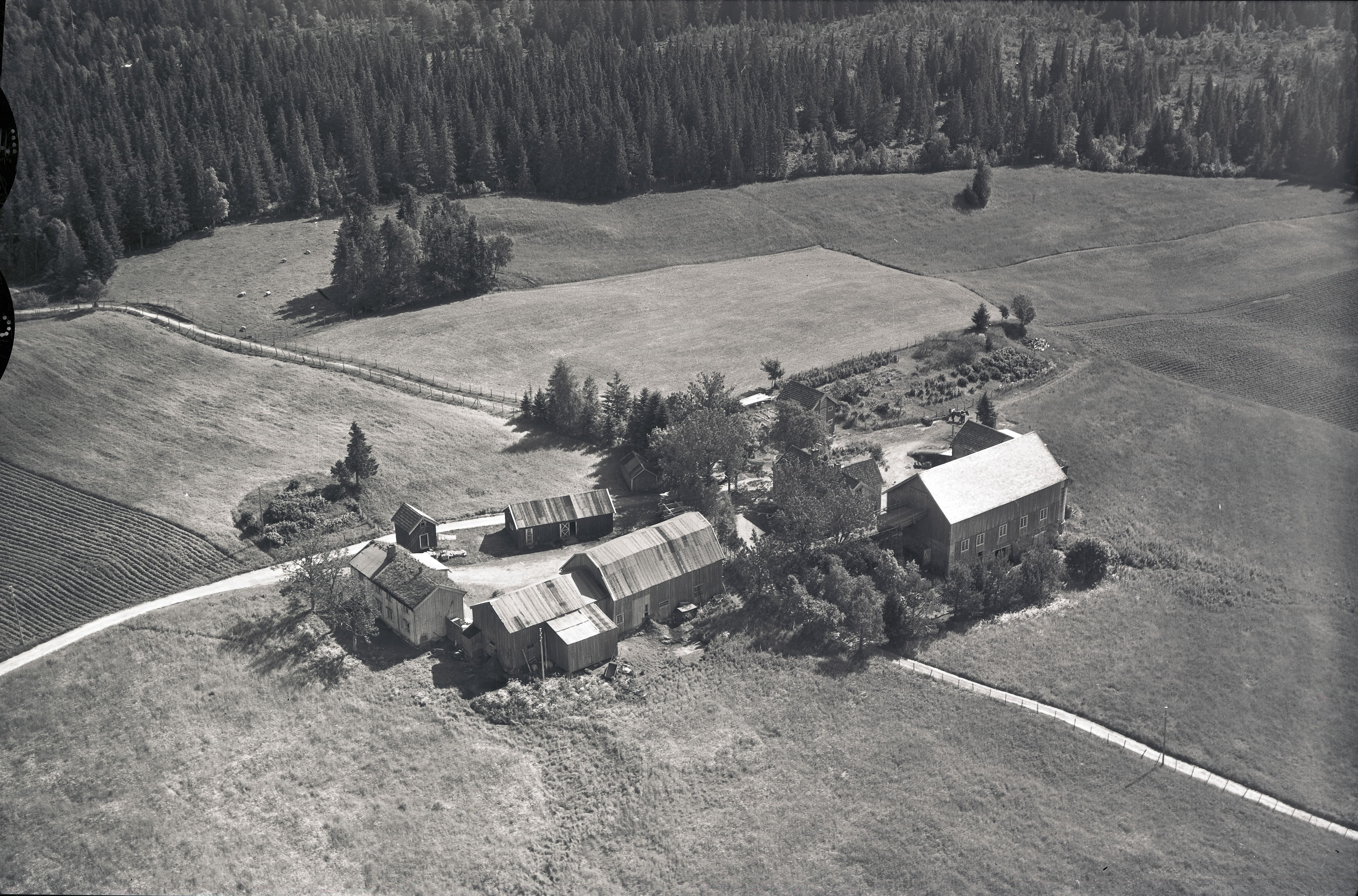 Vådan (Våddan) gård på Byåsen, i Bymarka, sør for Vådanvegen.